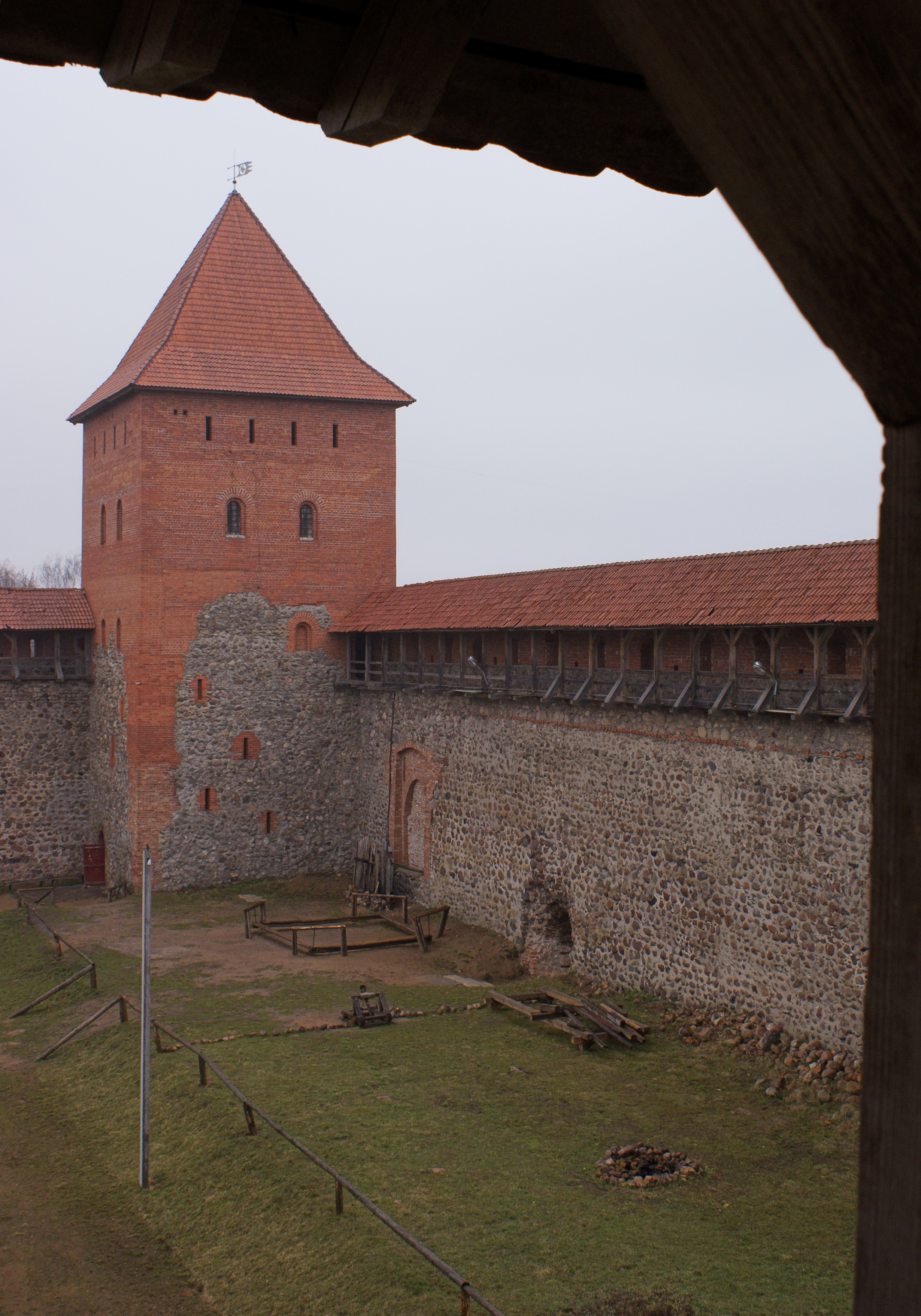 Замок в г. Лида This is a photo of Belarusian heritage monument. Reference number: 411Г000328 ( WLM)